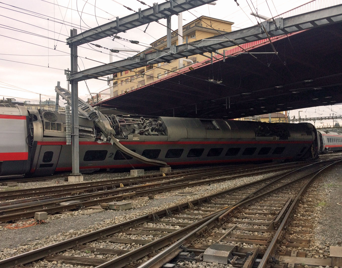 Am 22. März 2017, entgleisten zwei Wagen des Eurocitys 158 Mailand–Basel bei der Ausfahrt aus dem Bahnhof Luzern. Dabei kippte ein Wagen eines ETR 610 von Trenitalia zur Seite und riss die Fahrleitung herunter. Sechs Personen wurden leicht verletzt, die einzige normalspurige Zufahrt zum Bahnhof bleibt voraussichtlich bis zum 26. März unterbrochen.